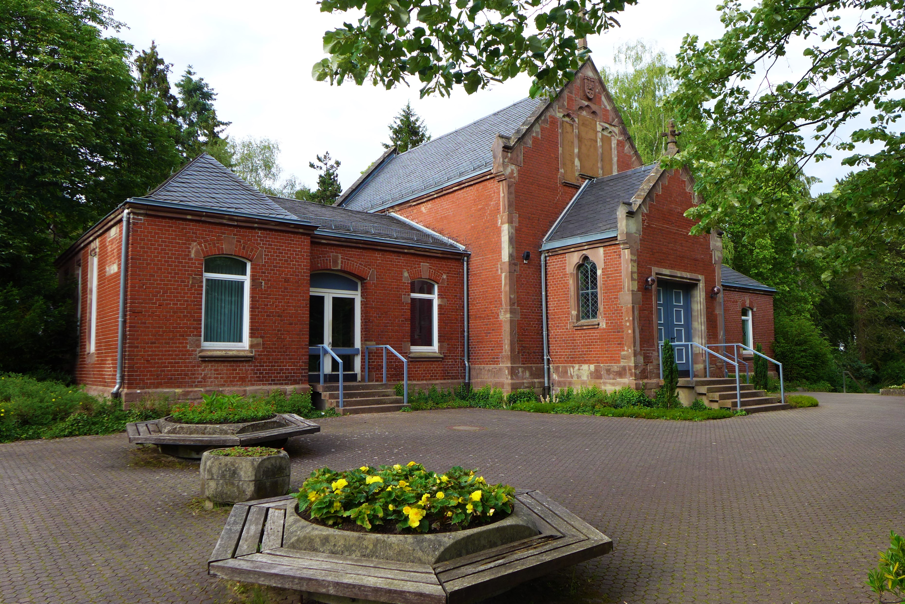 Waldfriedhof Burbach (Saarbrücken), Friedhofshalle